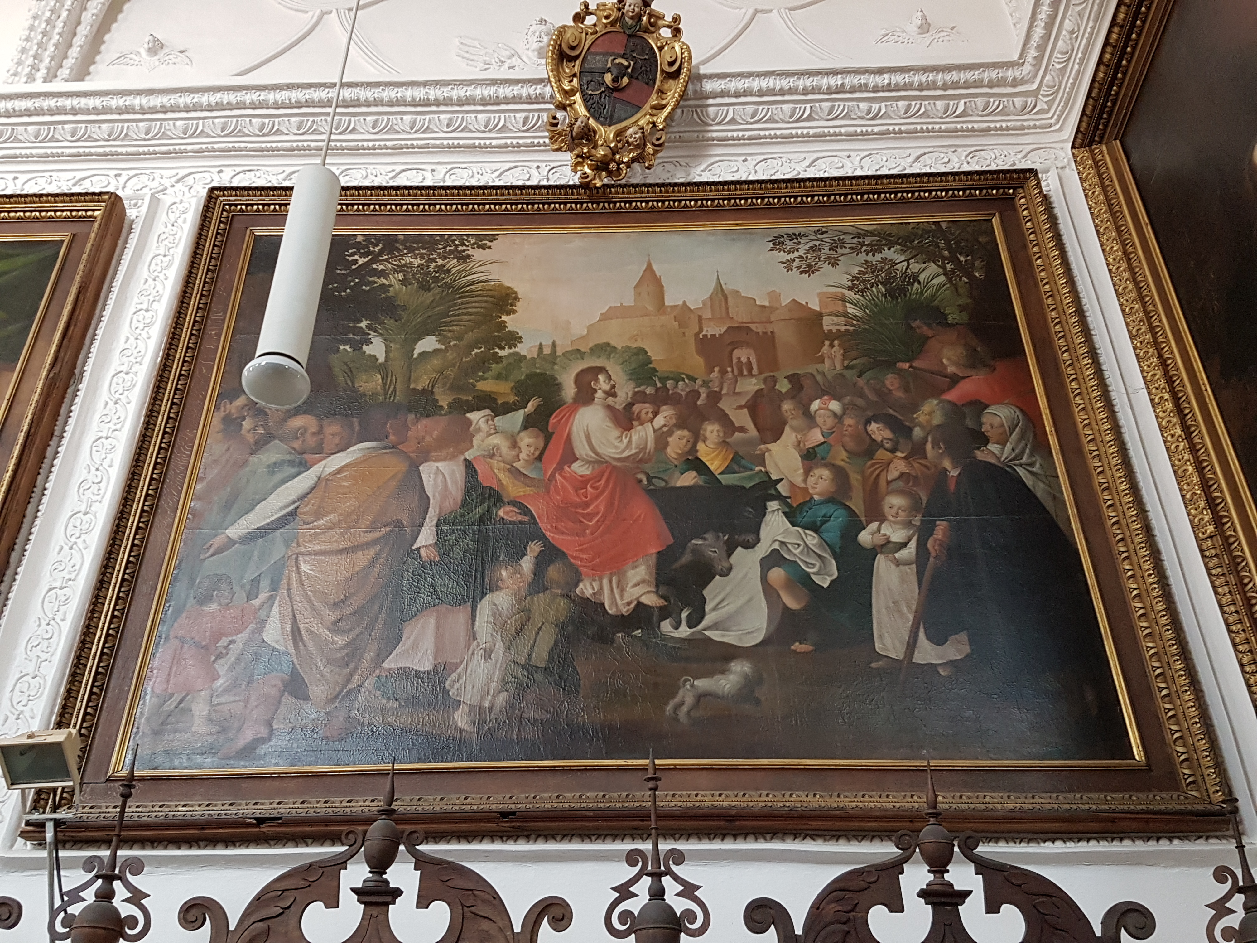 St. Vitus (Regensburg), Gemälde des Jesuszyklus